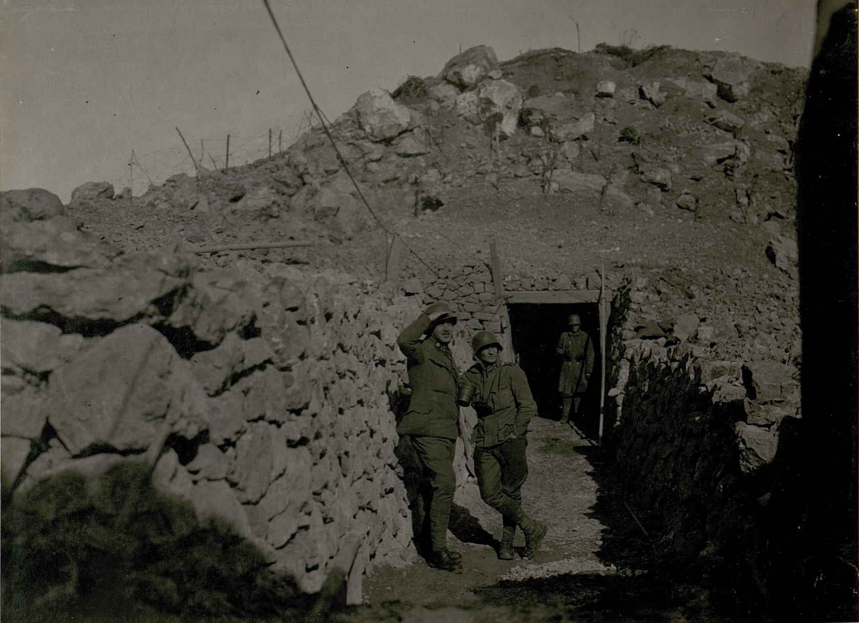 Sprengtrichter am Cimone. (23/II.1918.)